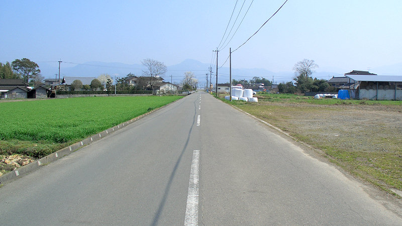 くま川鉄道湯前線ja:東免田駅 駅周辺 駅前西側を走る道路を南東方向に見る。 通りの先でja:国道219号と交差する。手前に行くとja:球磨川を渡る中島橋に出る。 撮影者/著者/著作権保有者 : MK Products (本人がアップロード) 撮影日 : 2007/03/22 東免田駅用にアップロードした画像です。良い画像があれば別の画像に変えてください。